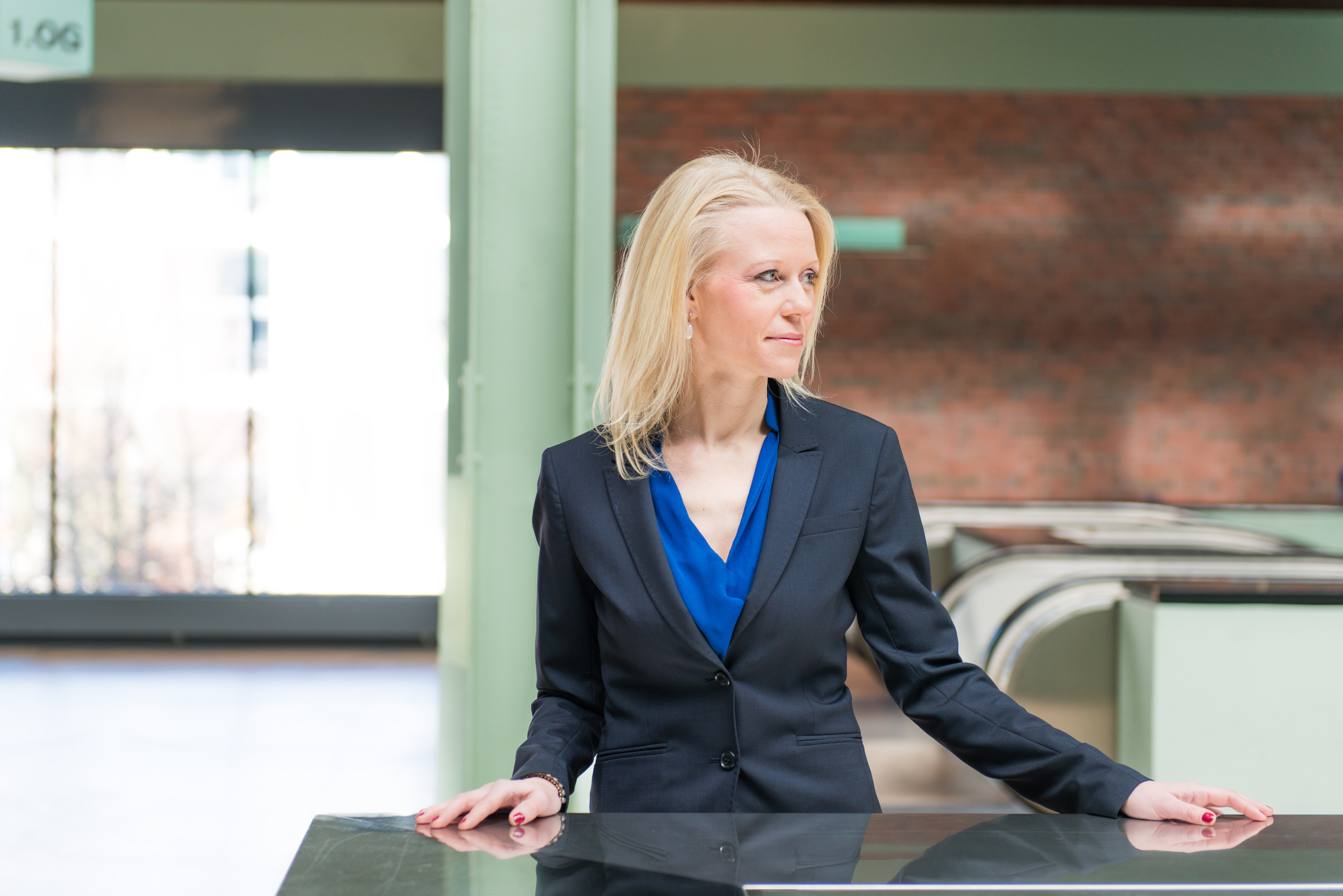 Lilian Studer